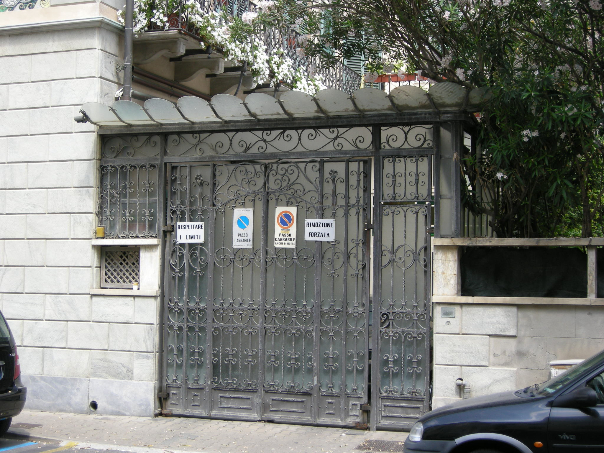 Villino Tolomei, cancello